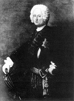 Christan Nicolaus von Linger (1669–1755)